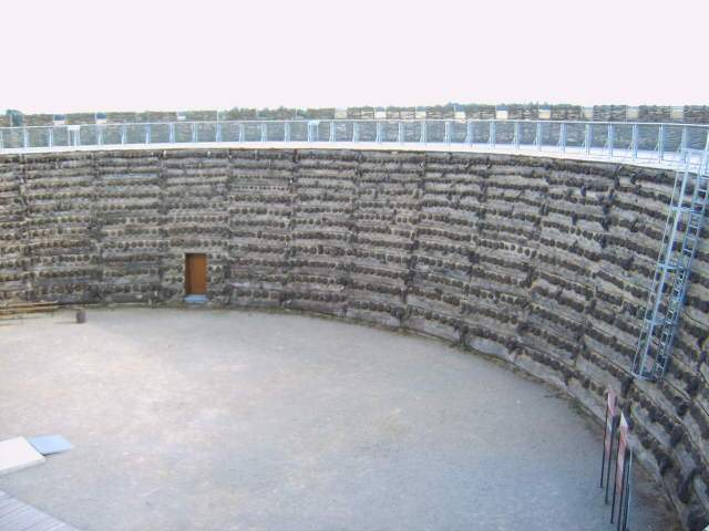 Slawenburg Raddusch, Innenhof, Wallanlage, Land Brandenburg, Deutschland Bild aufgenommen am 26.6.2006 durch Olaf Meister